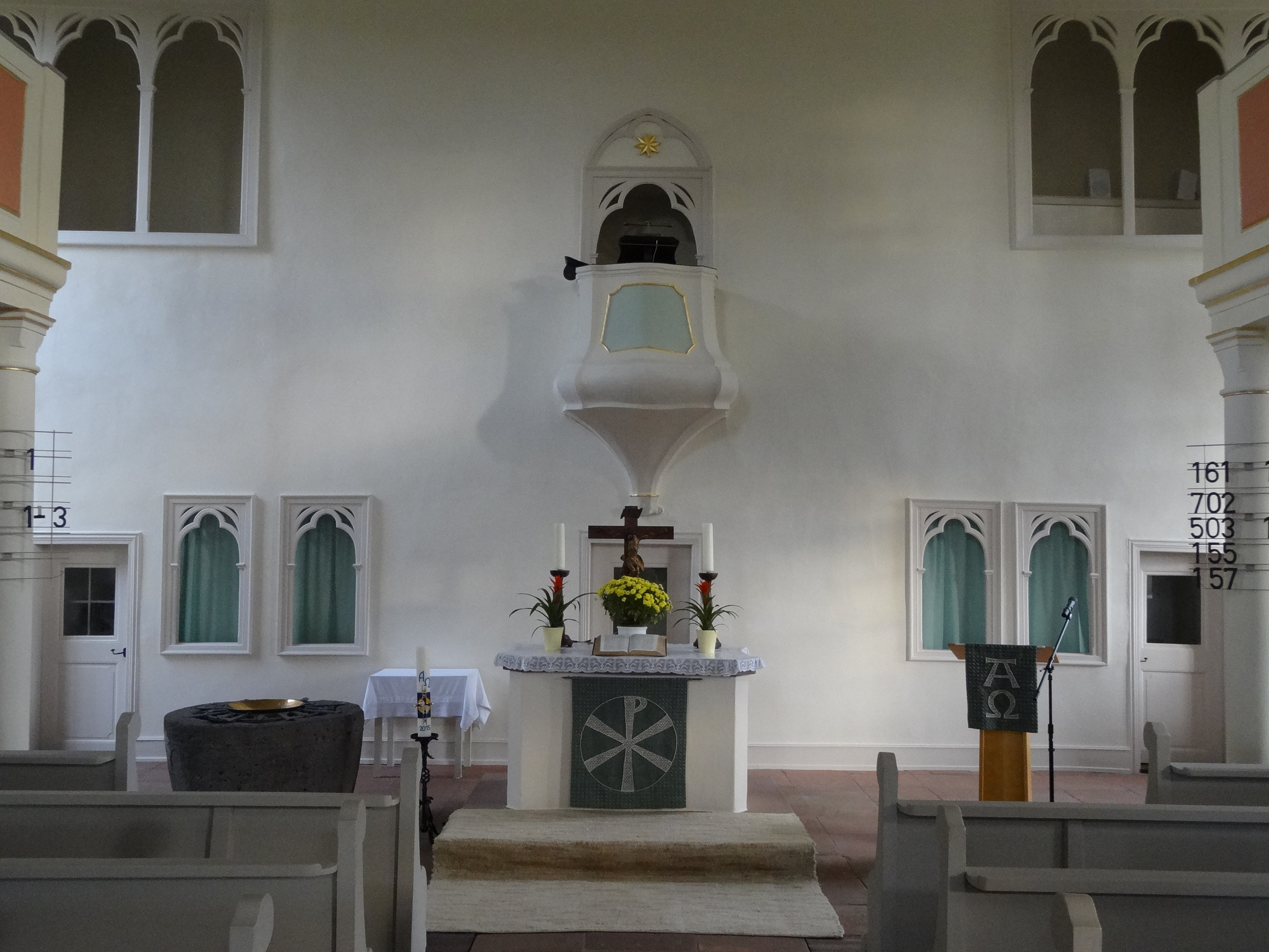 Evangelische Kirche Rodheim (Hungen)